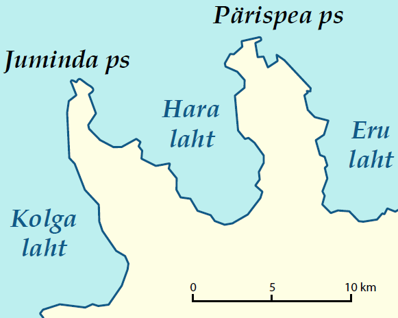 Juminda ja Pärispea poolsaare asendikaart